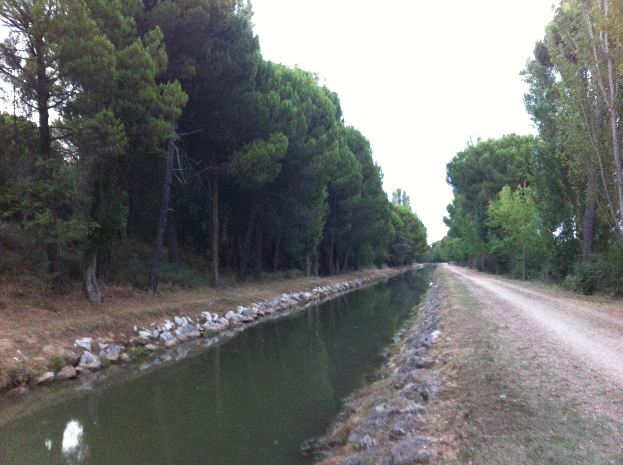 Canal del Duero en el término municipal de Laguna de Duero (Valladolid).